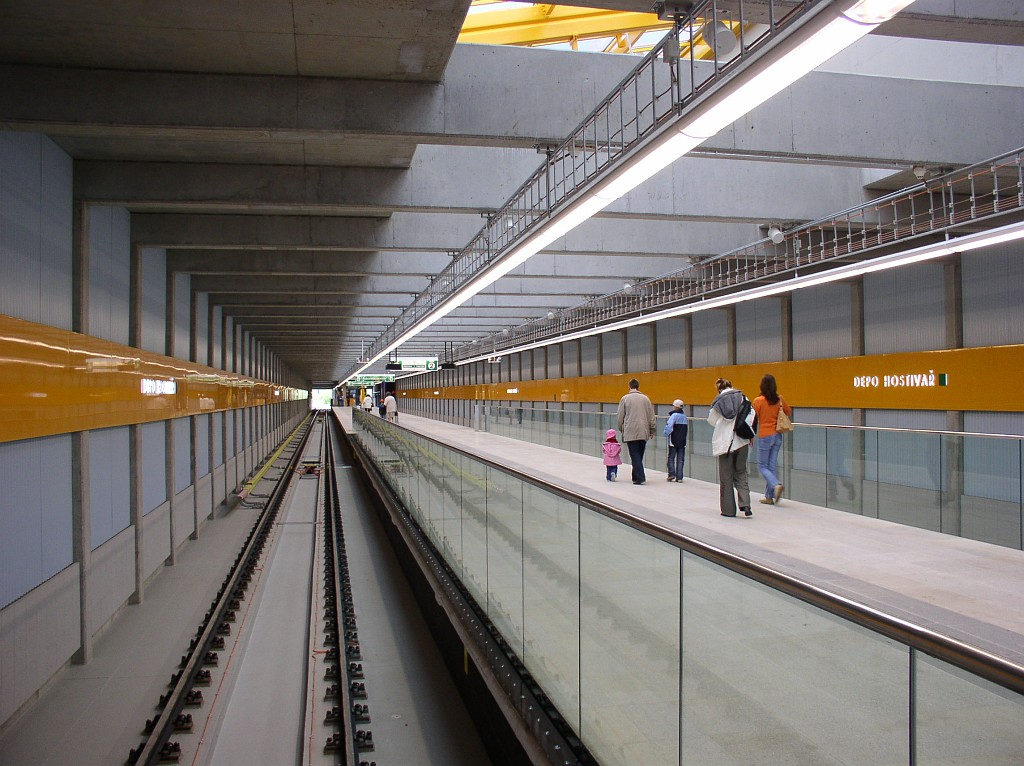 Metro station Depo Hostivař in Prague – Stanice metra Depo Hostivař